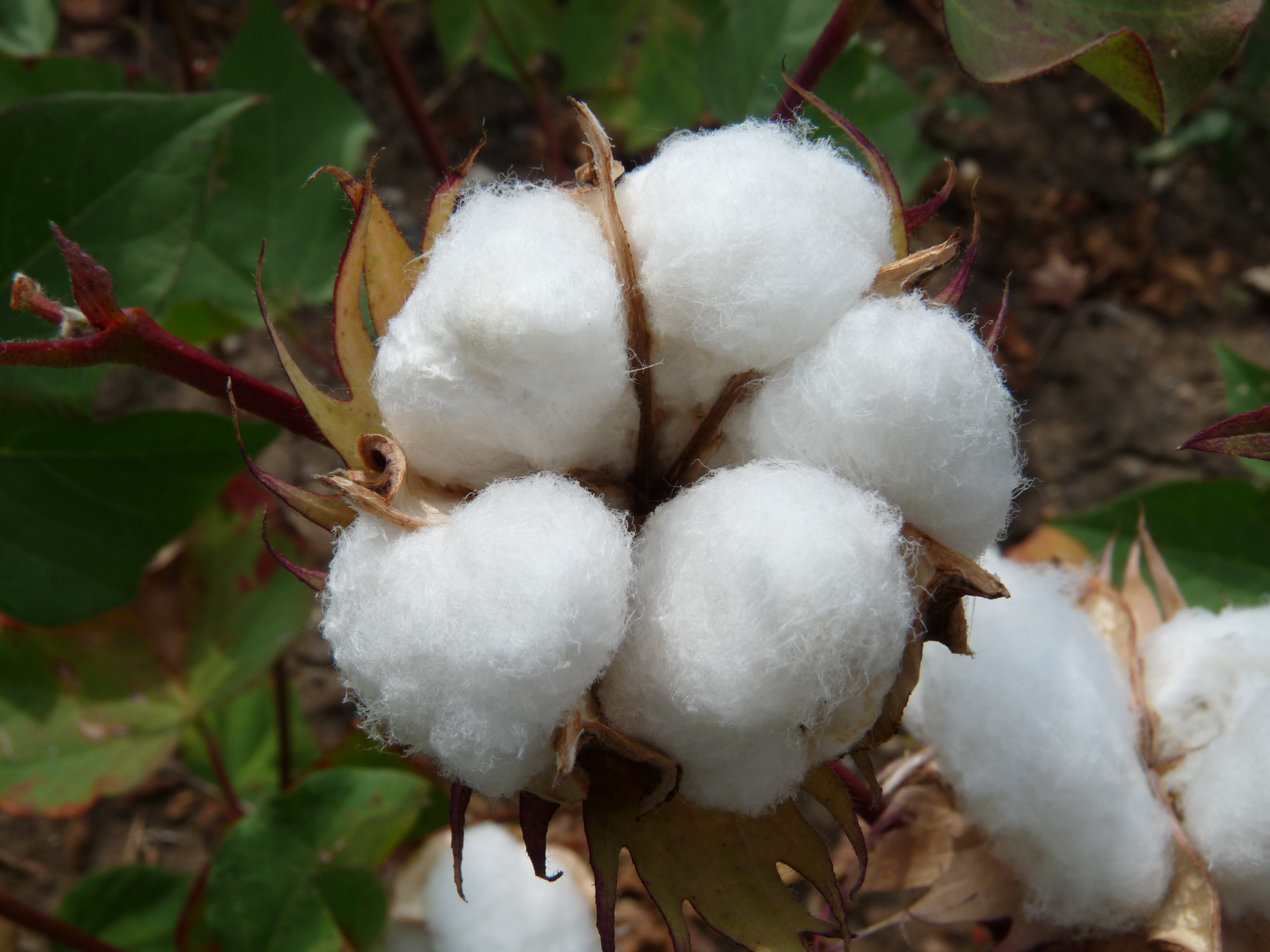 Livadia / Provicia Argolida / Grecia